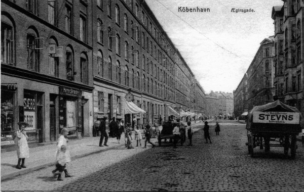 Ægirsgade set fra Nørrebrogade mod Mimersgade.